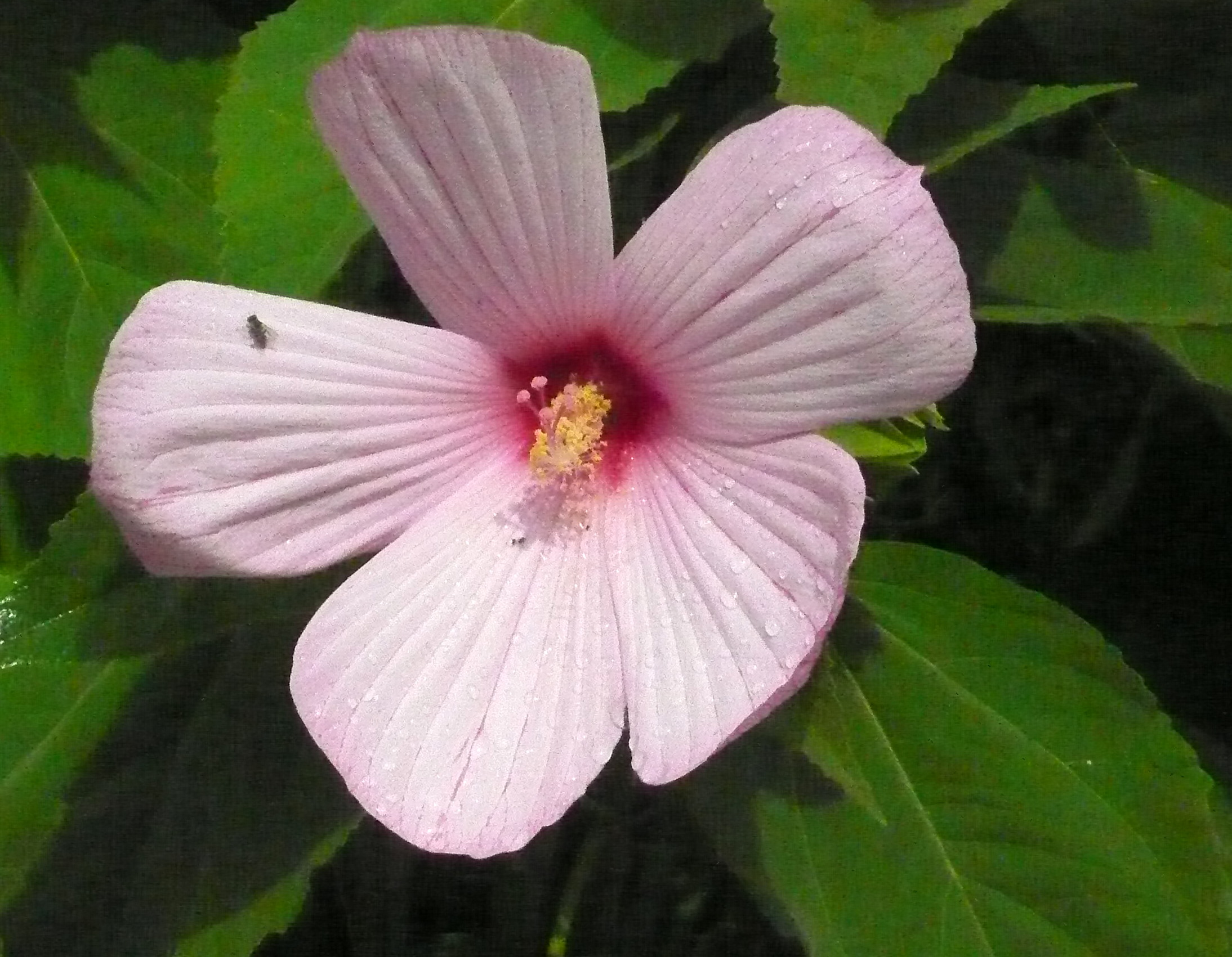 Mocsári hibiszkusz